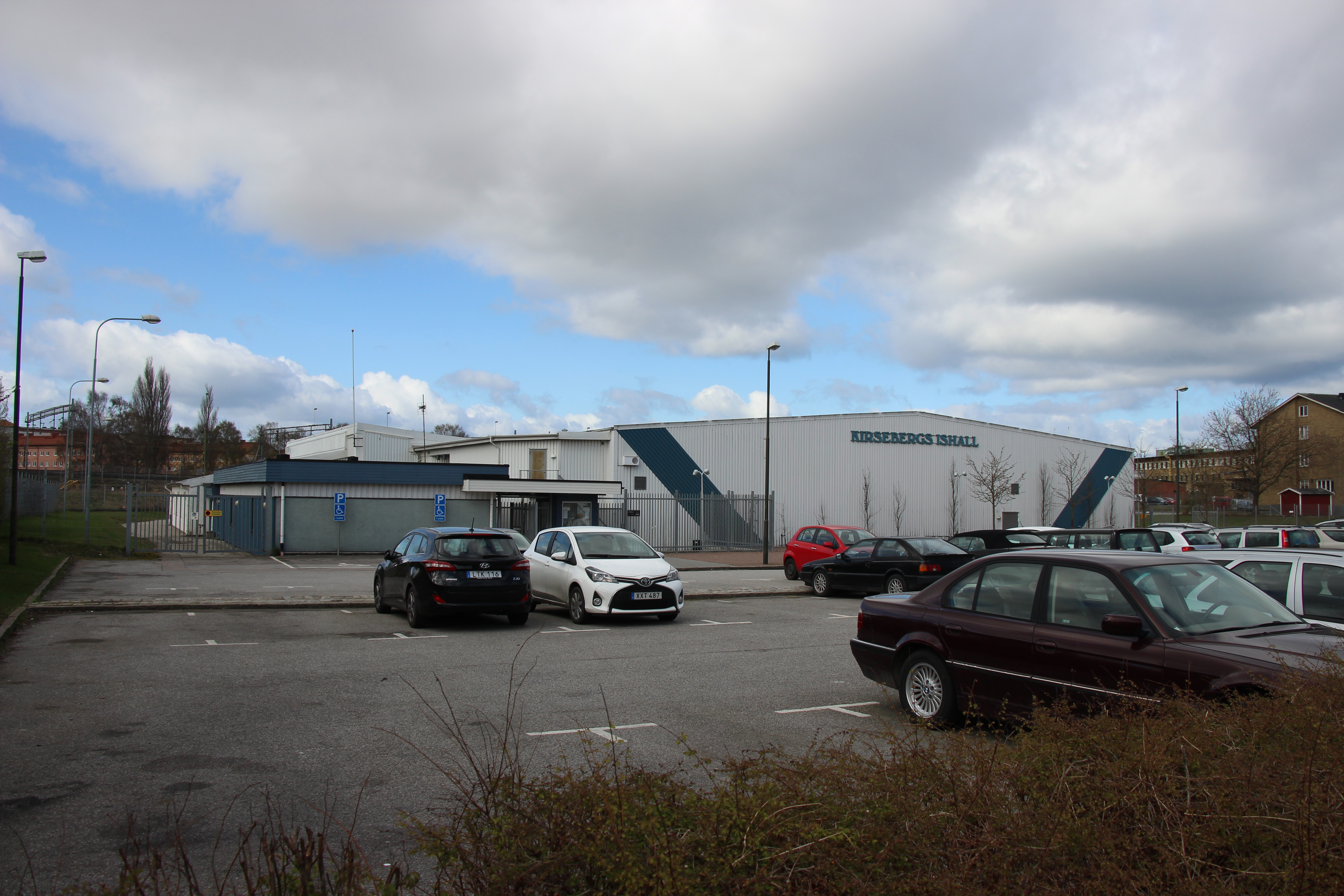 Kirsebergs ishall, IK Panterns hemmaarena tills de kvalificerade sig för Hockeyallsvenskan.